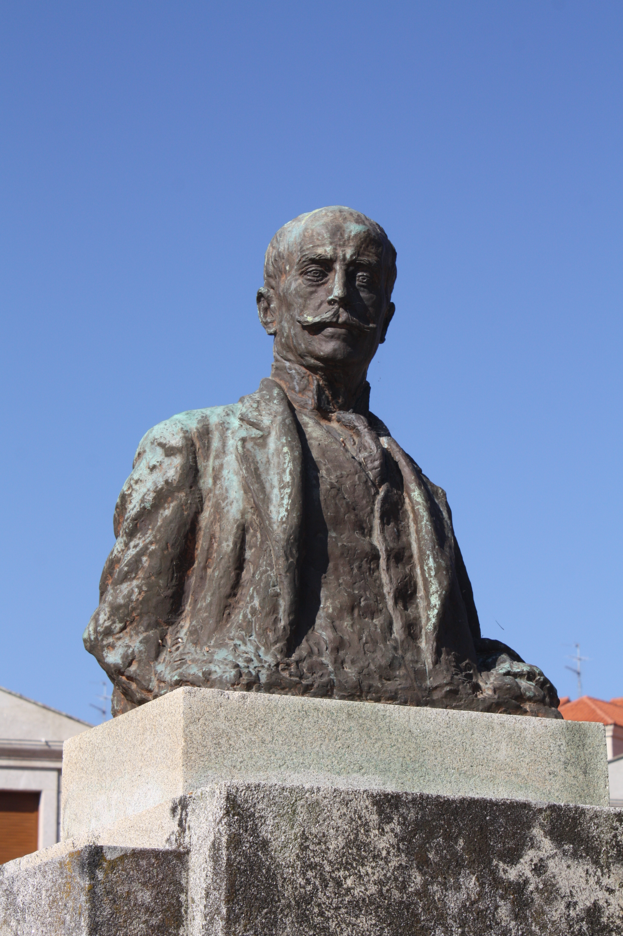 Busto de José Riestra López (1852-1923), primeiro marqués de Riestra, propietario no seu momento da Illa da Toxa e fundador do Gran Hoterl Balneario da Toxa, en 1908.